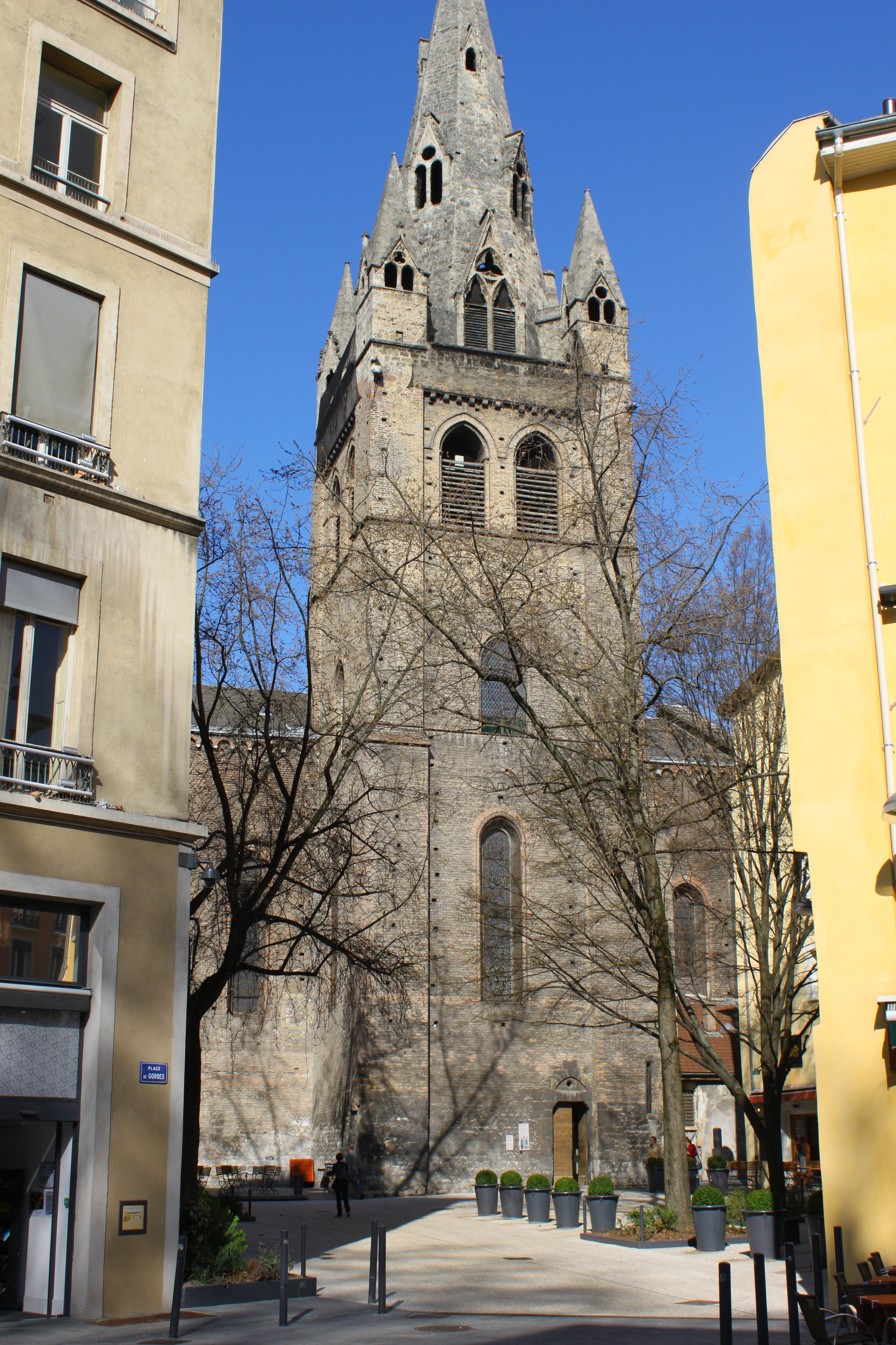 La Collégiale Saint-André de Grenoble vu depuis la place de Gordes.